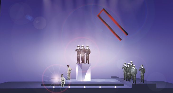 Der Jasager de Kurt Weill et Bertold Brecht